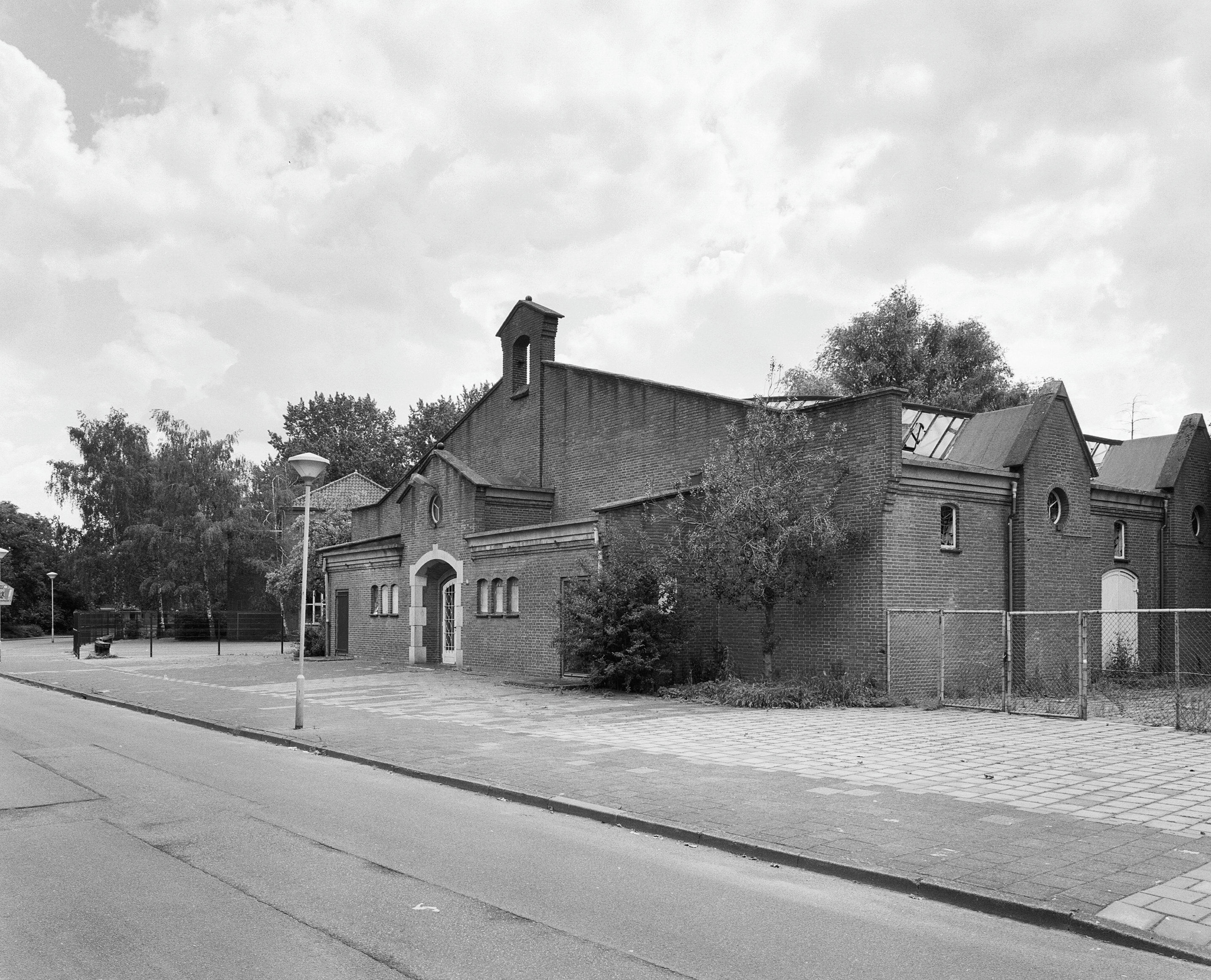 Wederopbouw: Overzicht